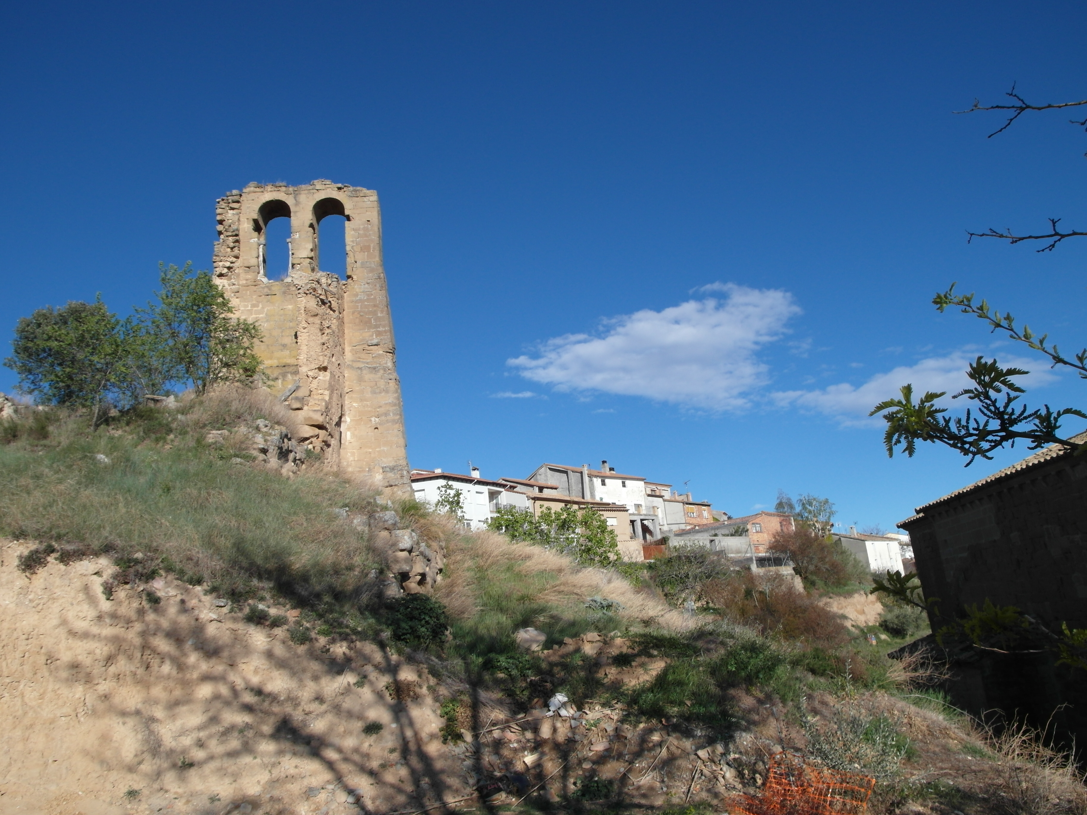 Alberuela de la Liena, Jaca, Huesca, España.